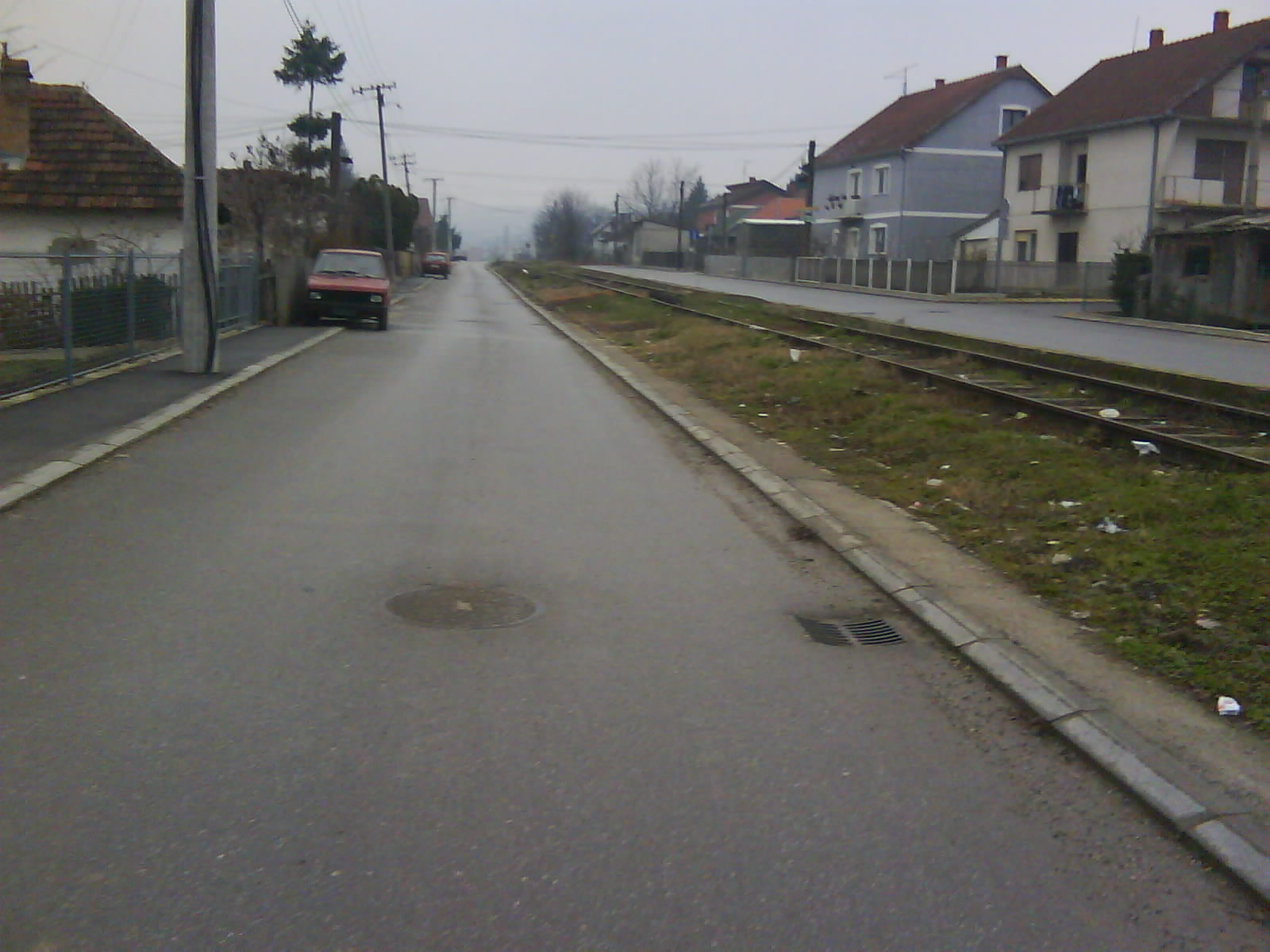 Ulica u Beloševcu. Autor Nenad Markovic